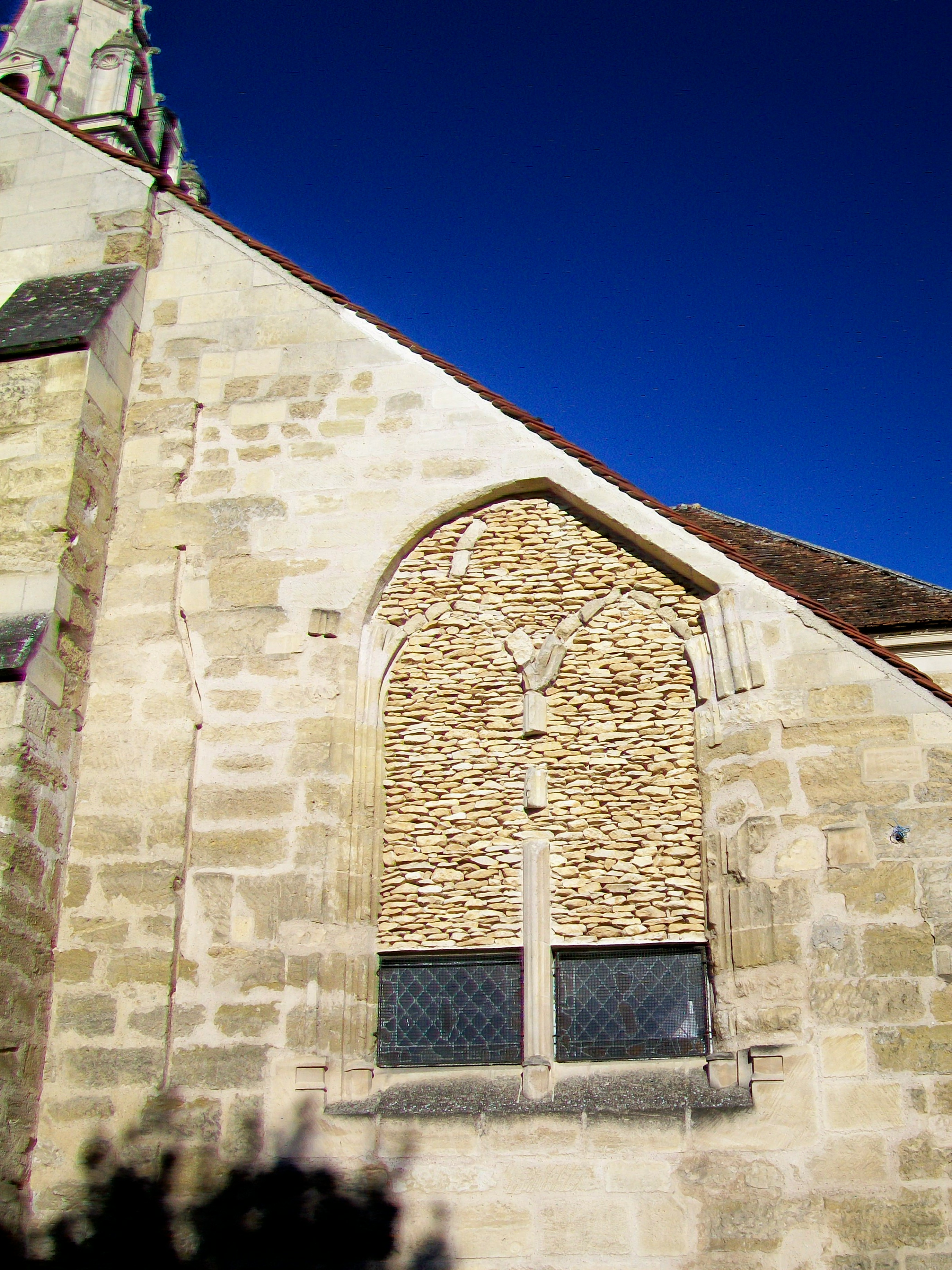 Fenêtre bouchée de l'abside nord-est.